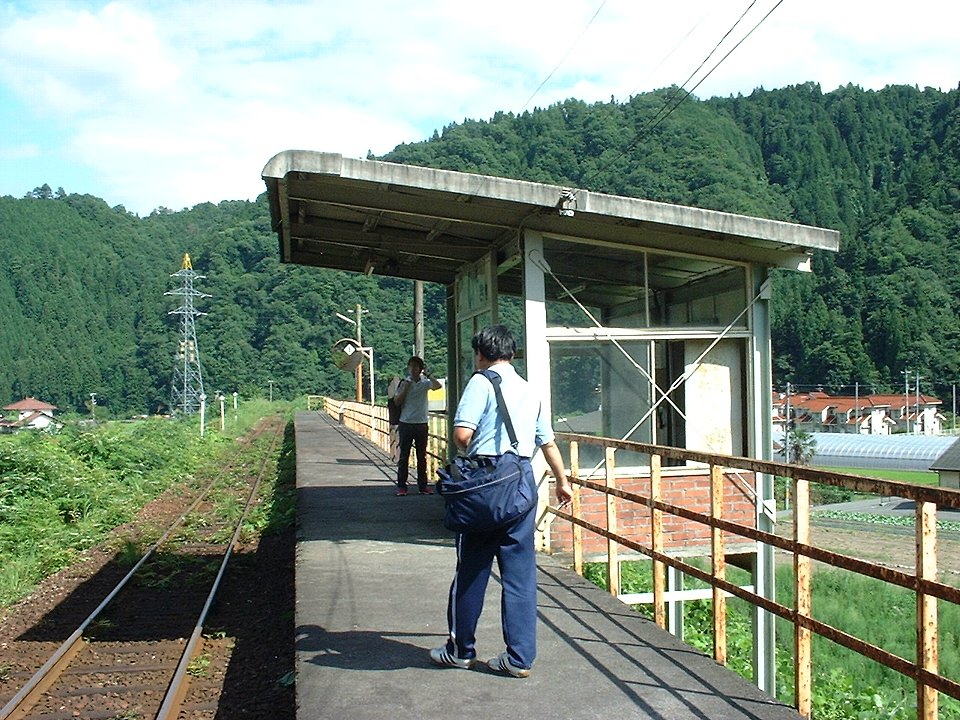 可部線土居駅ホーム（現在廃駅）